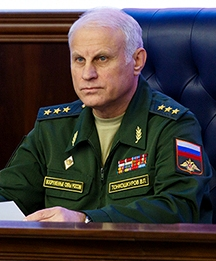 Генерал-полковник Тонкошкуров Василий Петрович